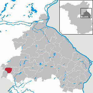 Neuenhagen bei Berlin in Brandenburg (Country) - District Märkisch-Oderland